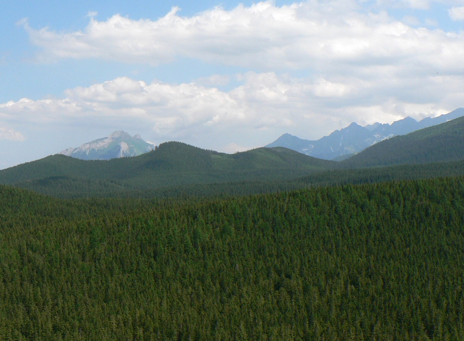 Ostry Wierch ze szczytu Wielkiego Kopieńca. W tle Tatry Bielskie i Wysokie